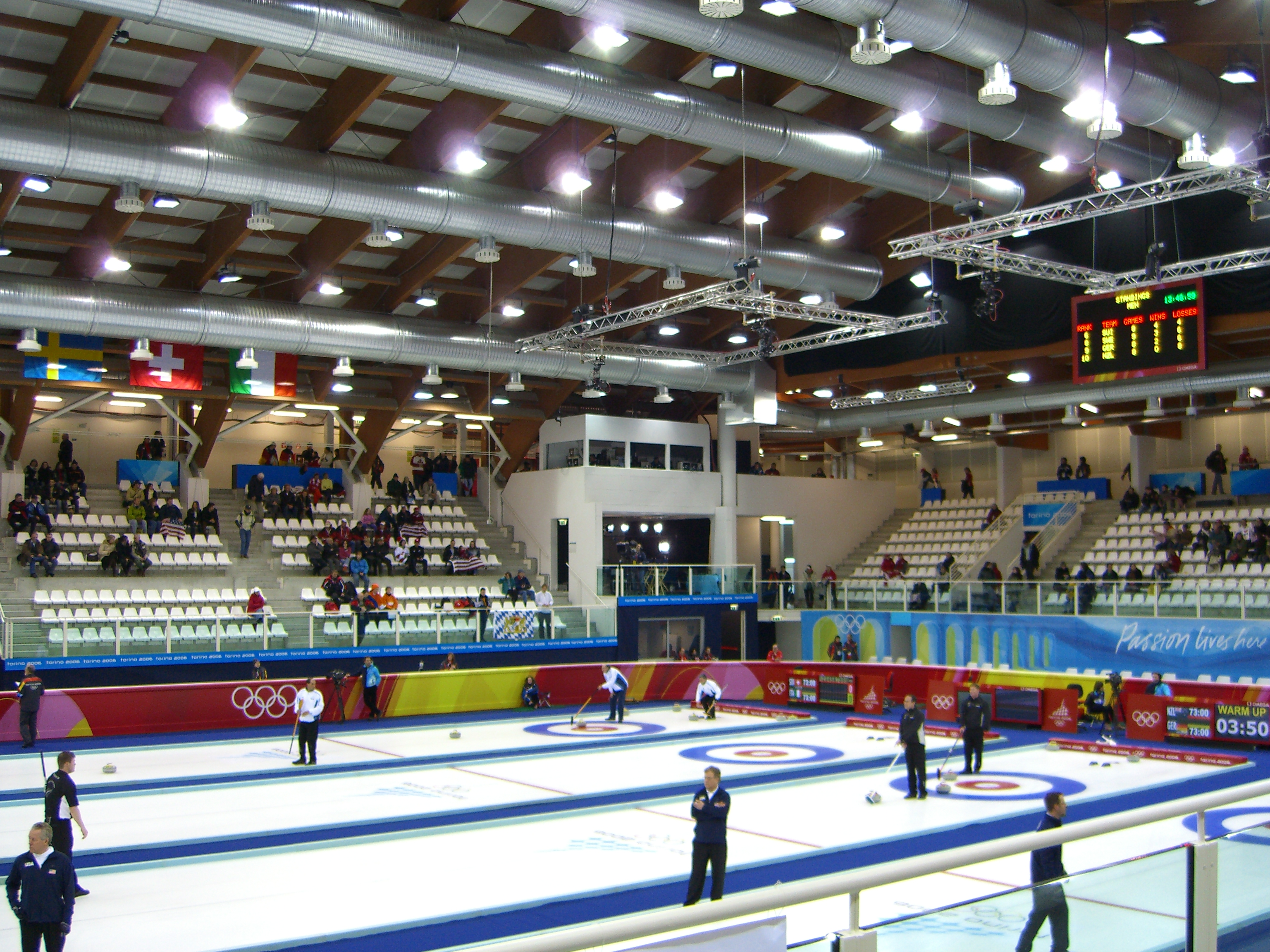 Curling delle olimpiadi invernali di Torino del 2006. Pinerolo, Palaghiaccio, interno.